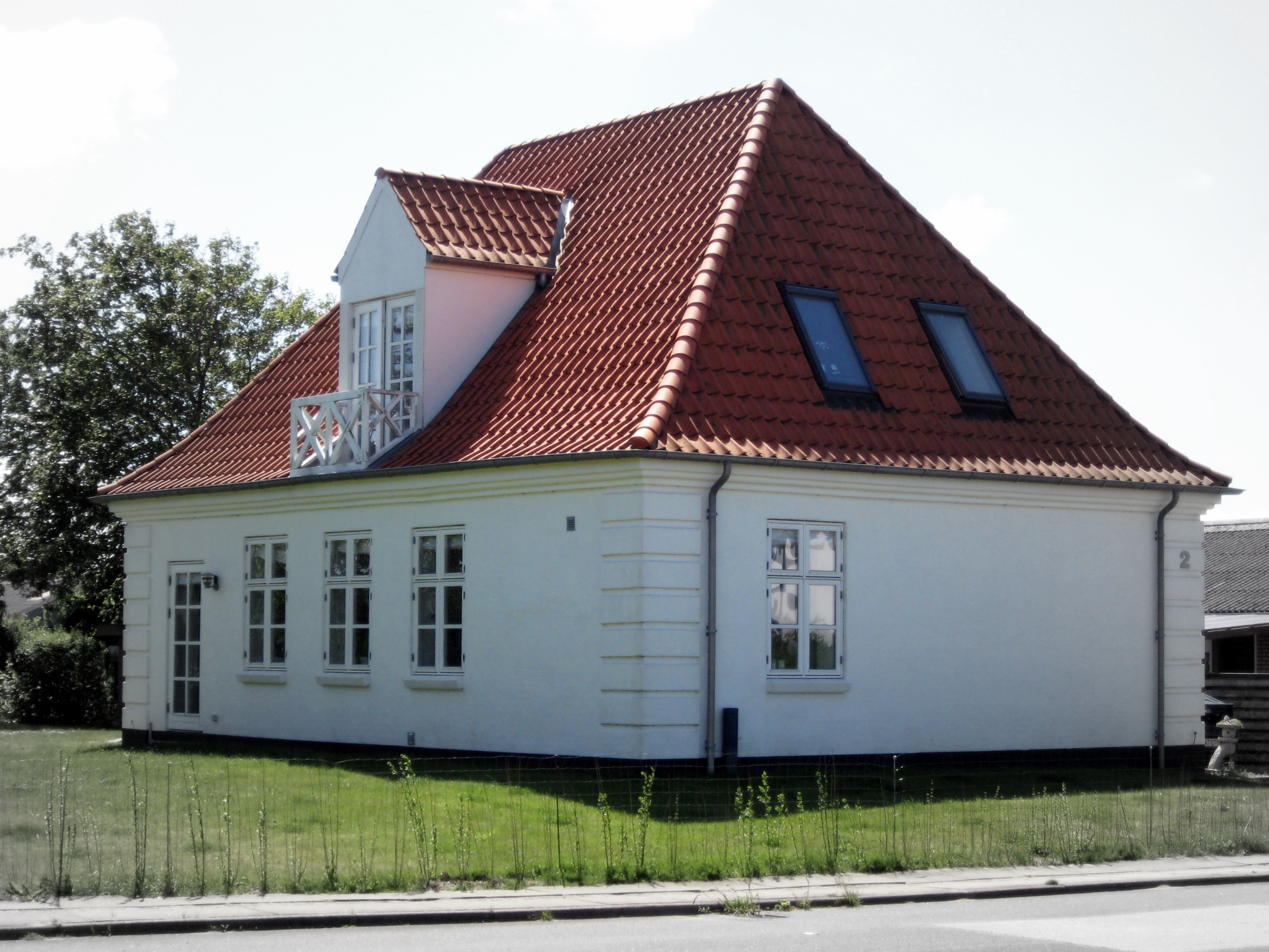 Gl. Station i Kås, se Hjørring-Løkken-Aabybro Jernbane